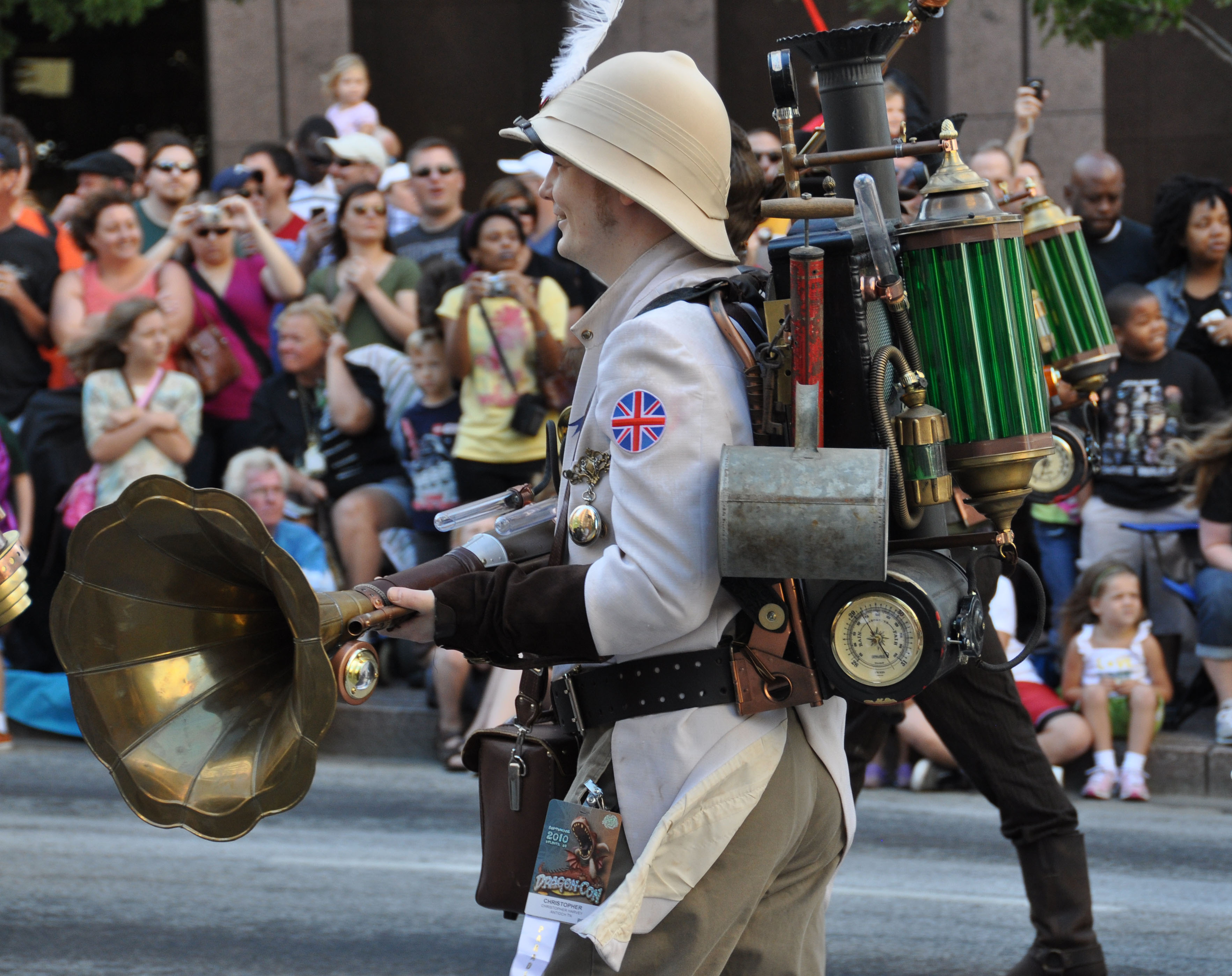 Atlanta Dragon Con Parade 2010